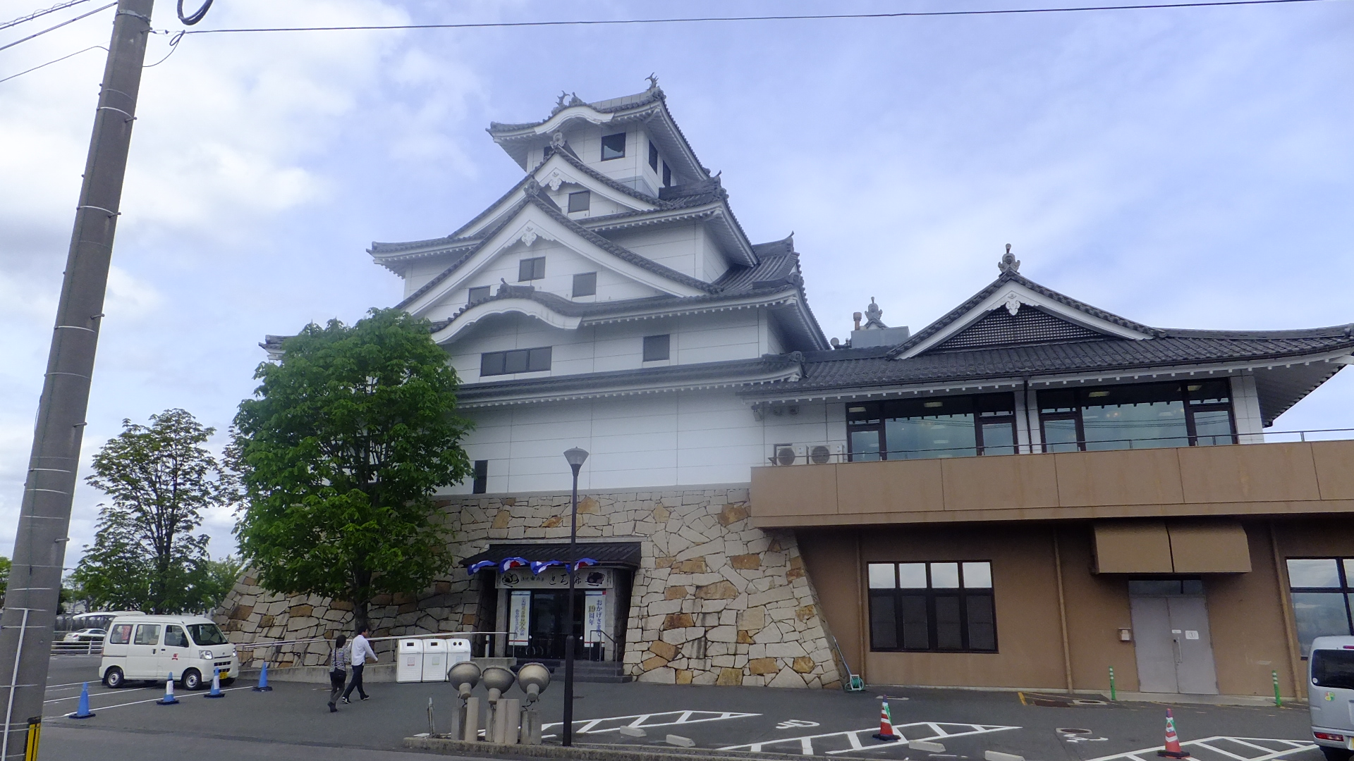 お菓子の城